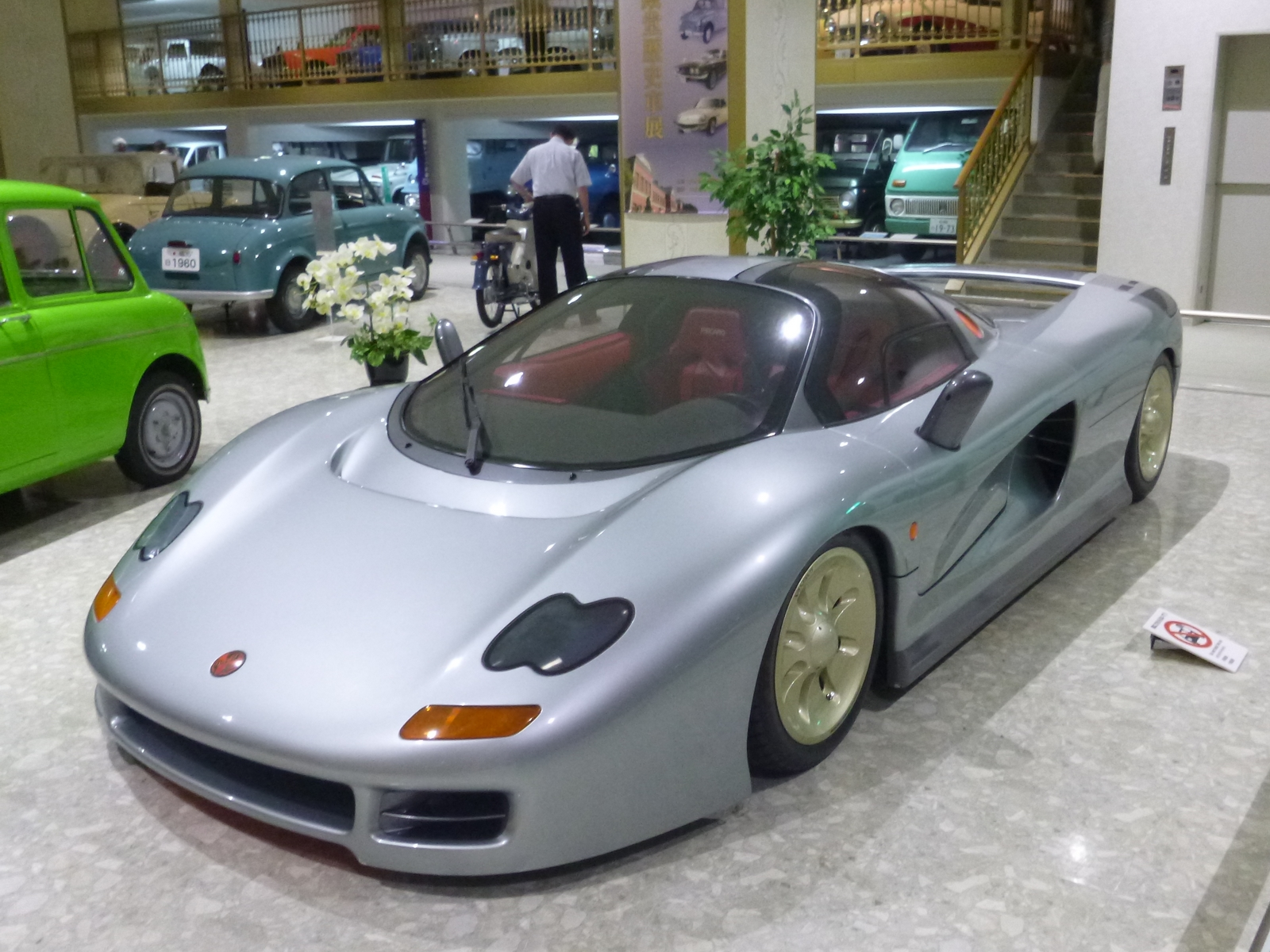 ジオット キャスピタ 1号車（日本自動車博物館所蔵）